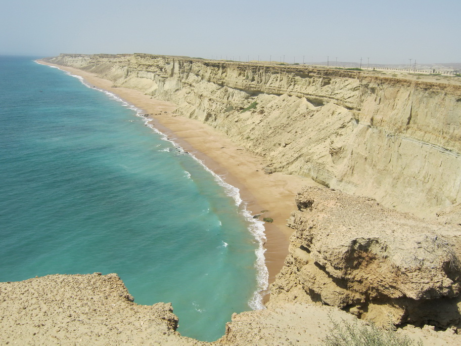 Steilküste am Arabischen Meer in Makran in der iranischen Provinz Belutschistan.